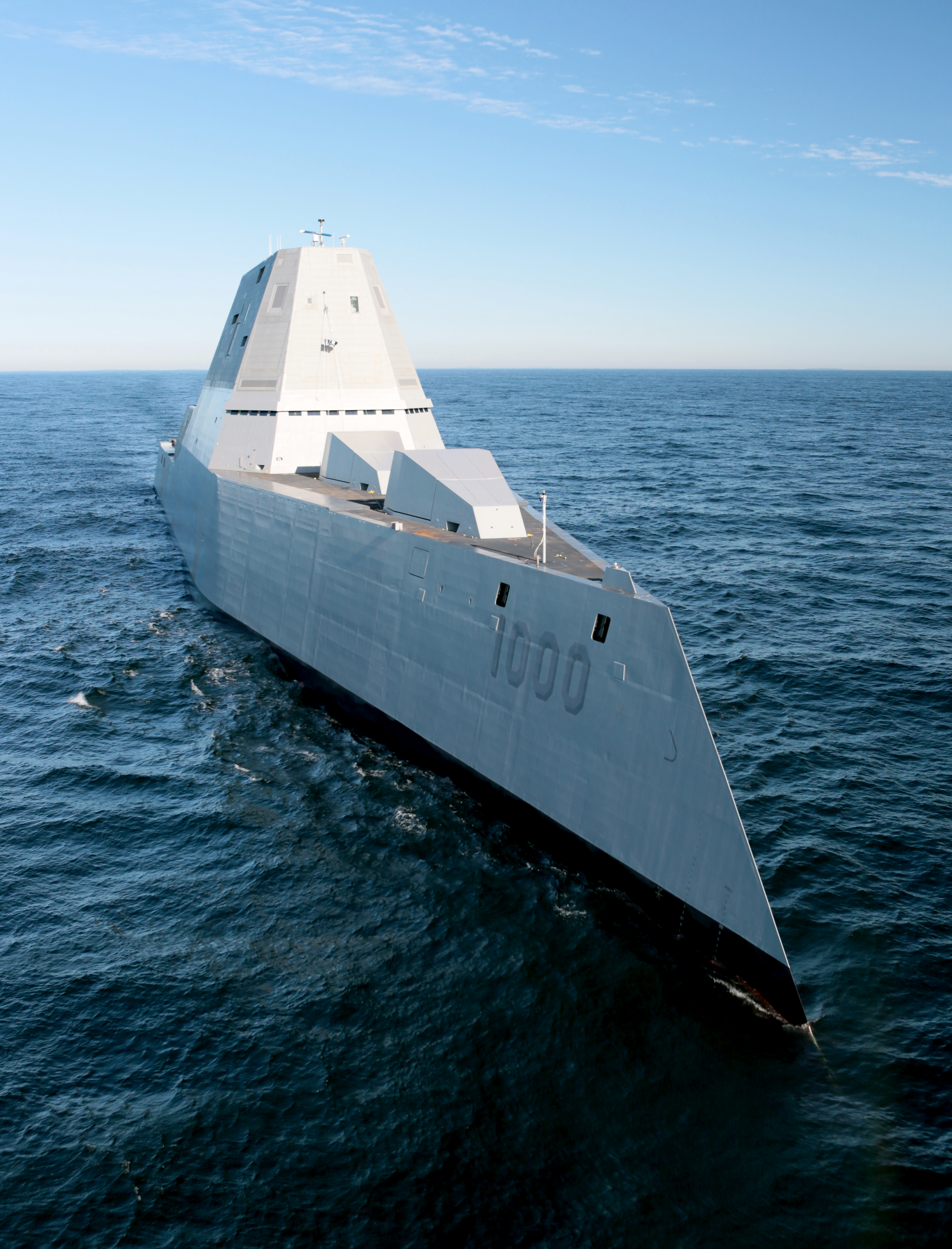 USS Zumwalt